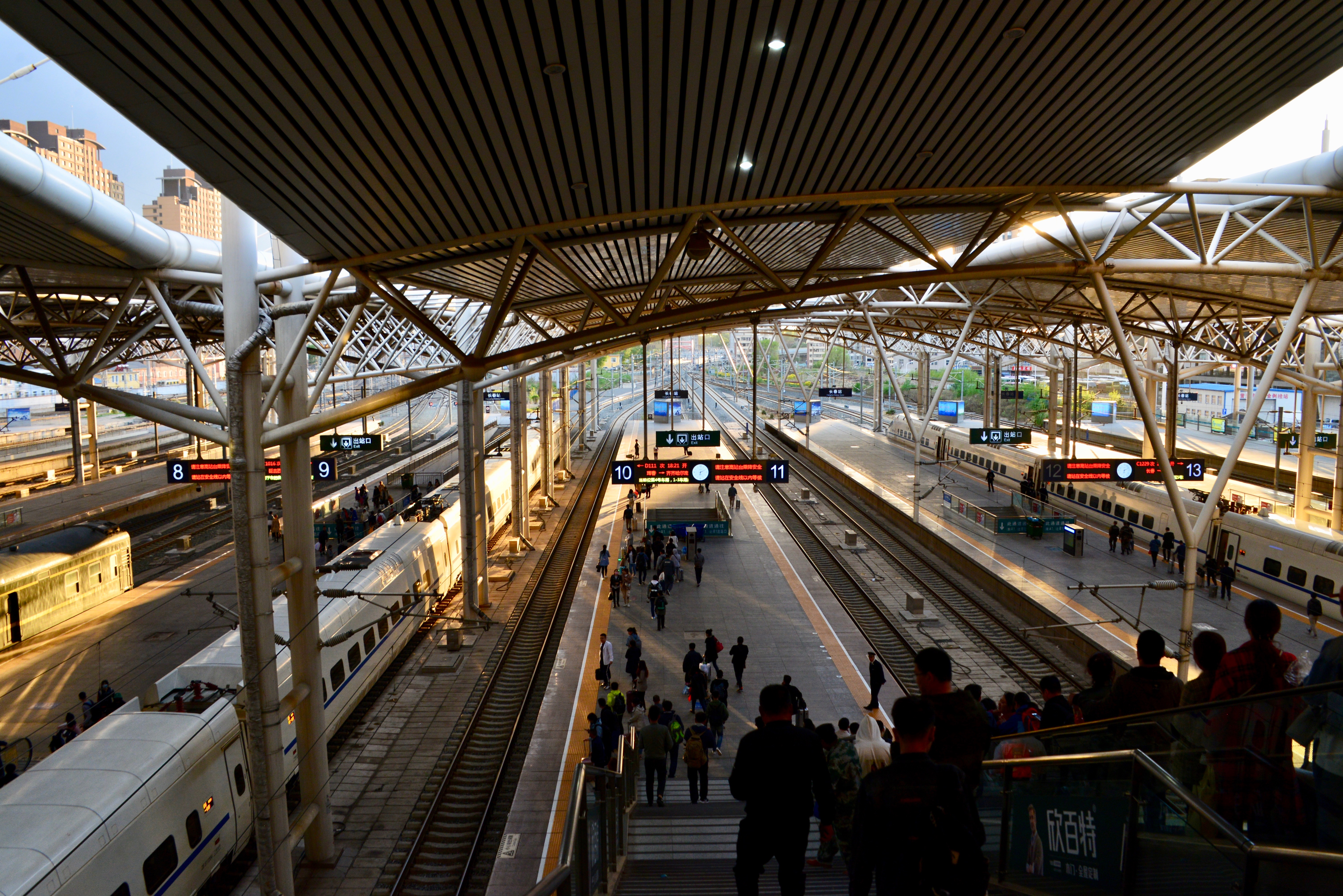 中文（中国大陆）: 长春站 2019